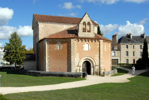 Baptistere Saint-Jean